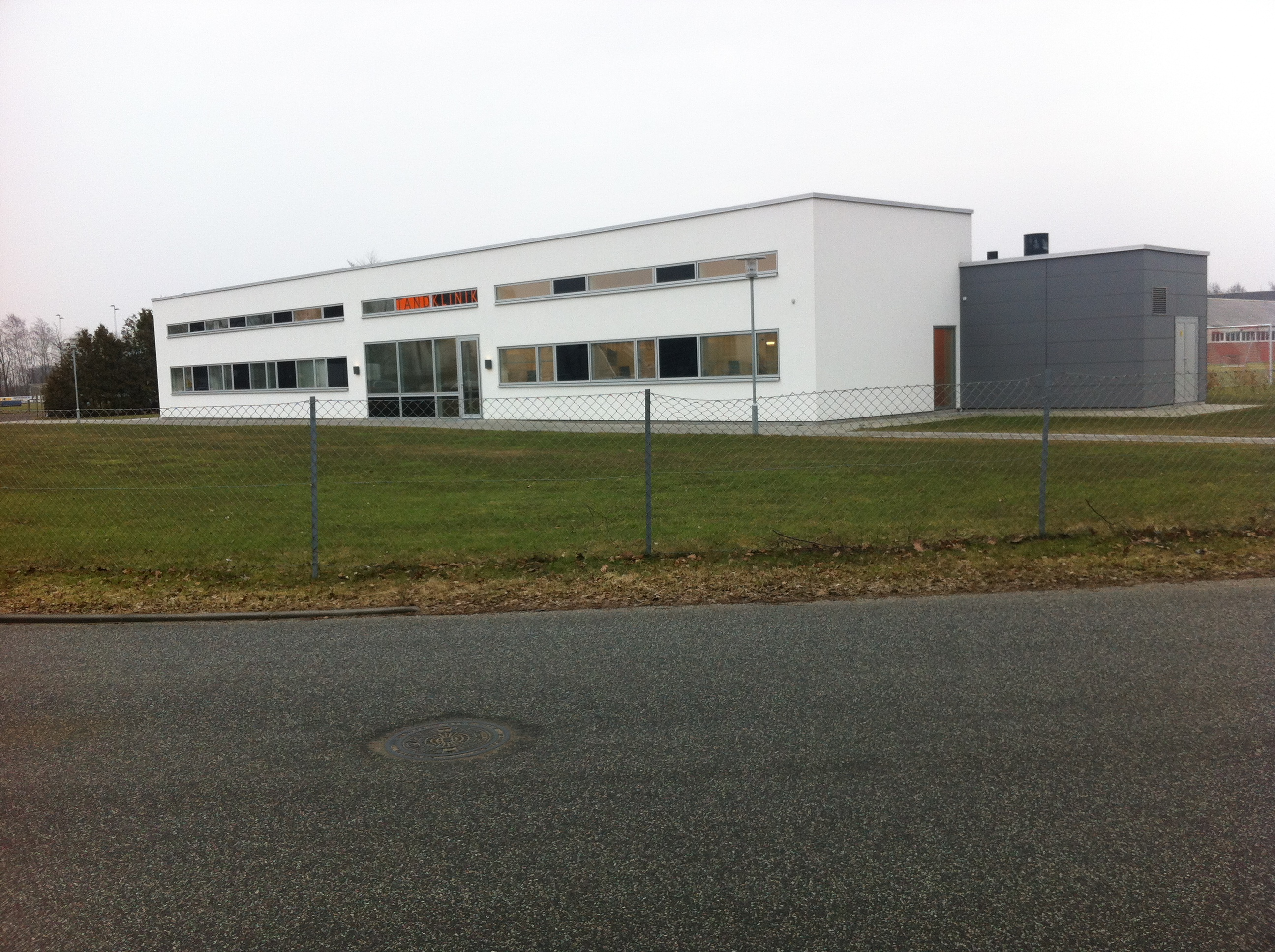 Hadsund Tandklinik stod færdig i 2010.